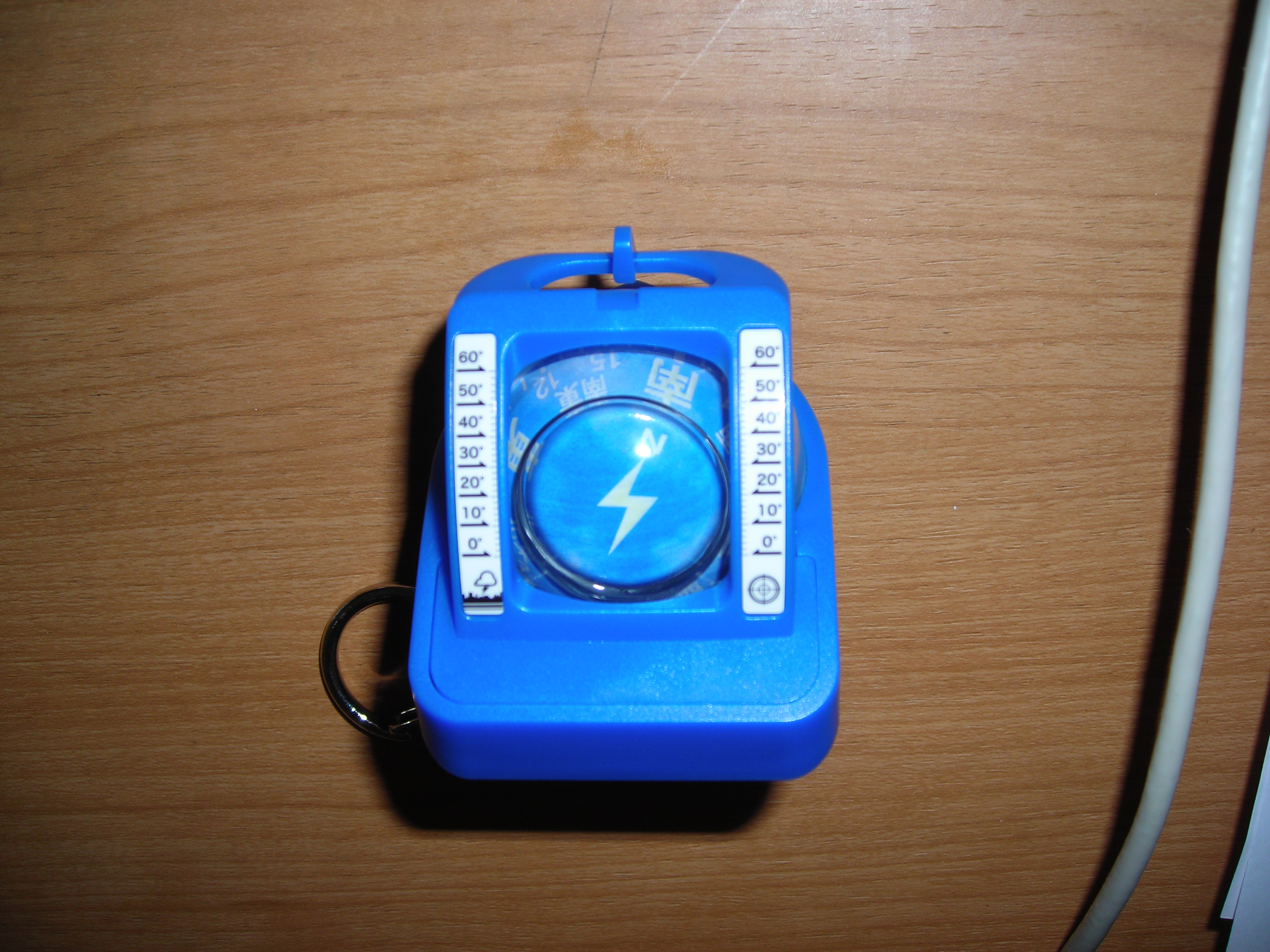 ゲリラ雷雨防衛隊2010の入隊記念品